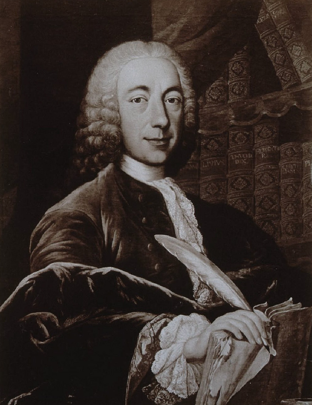 Jean-Daniel Schœpflin, historien (1694-1771). Né à Sulzbach (Bade), professeur d'histoire et d'éloquence à l'Université de Strasbourg, historiographe et conseiller du roi, auteur de l'Alsatia Illustrata, décédé à Strasbourg. Revue alsacienne illustrée, 1910. Bibliothèque nationale et universitaire de Strasbourg